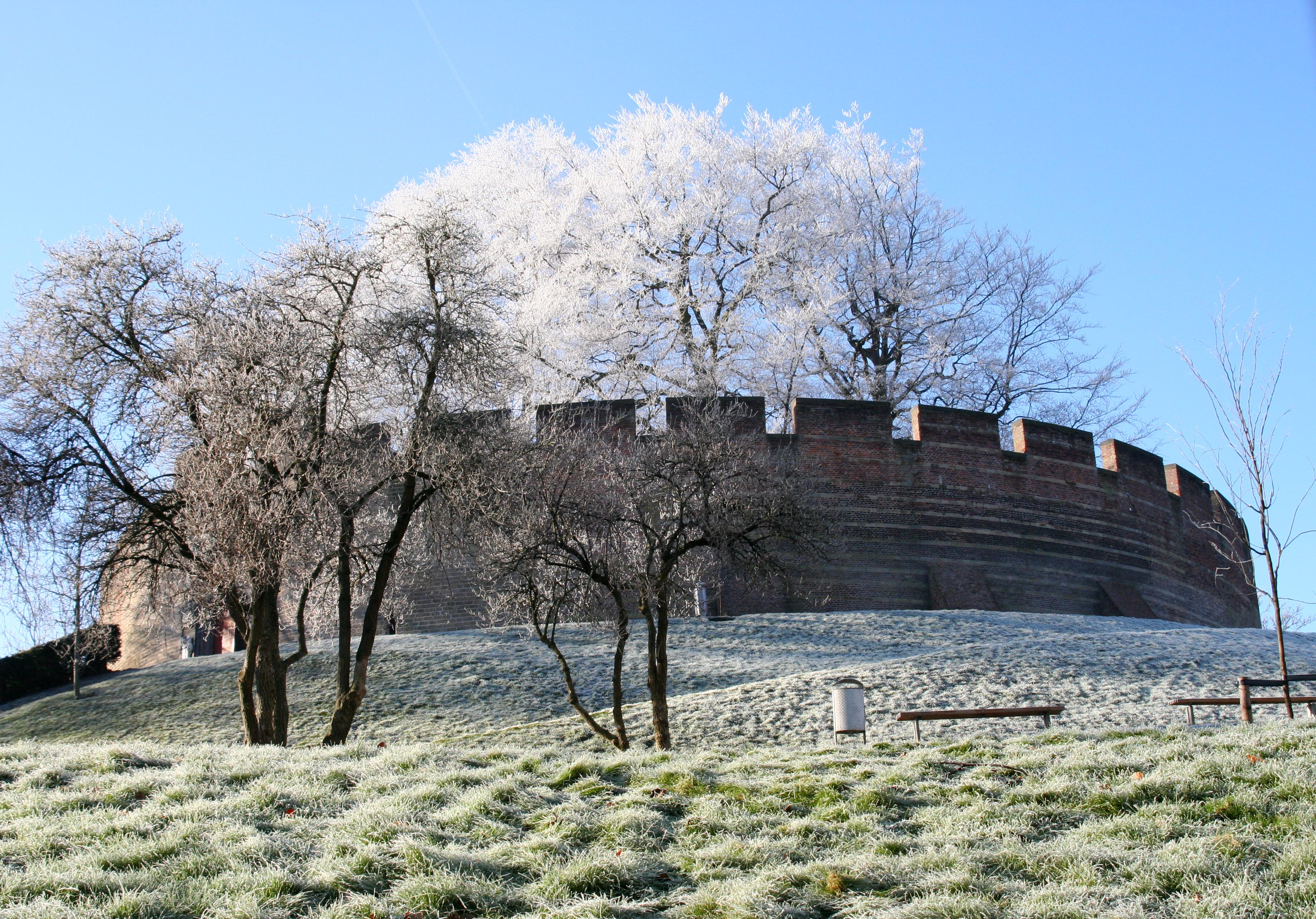 De burcht van Leiden is een van de oudste nog bestaande voorbeelden van een burcht in Nederland. Het bouwwerk bevindt zich midden in Leiden, op de plek waar de twee armen van de Rijn samenvloeien. Het ronde bouwwerk bevindt zich op een motte, een kunstmatige heuvel, en kan worden betreden door een zandstenen poort.